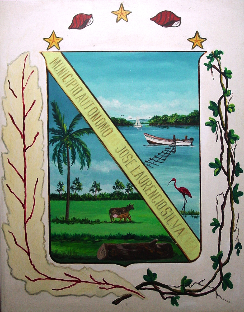 escudo del municipio jose laurencio silva (Venezuela)